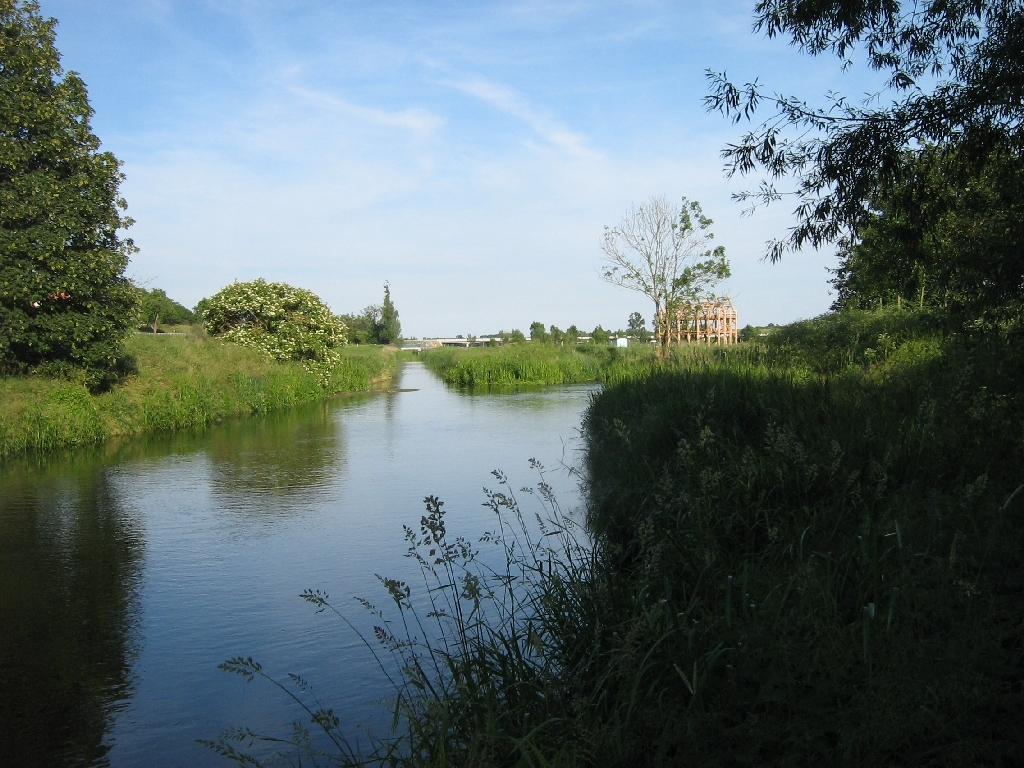 Einmündung des „Großen Landgrabens“ in die Tollense in Nähe der Ortschaft Klempenow im Landkreis Mecklenburgische Seenplatte in Vorpommern. Der Wehrspeicher (Kemlade) Wodarg im Bau.